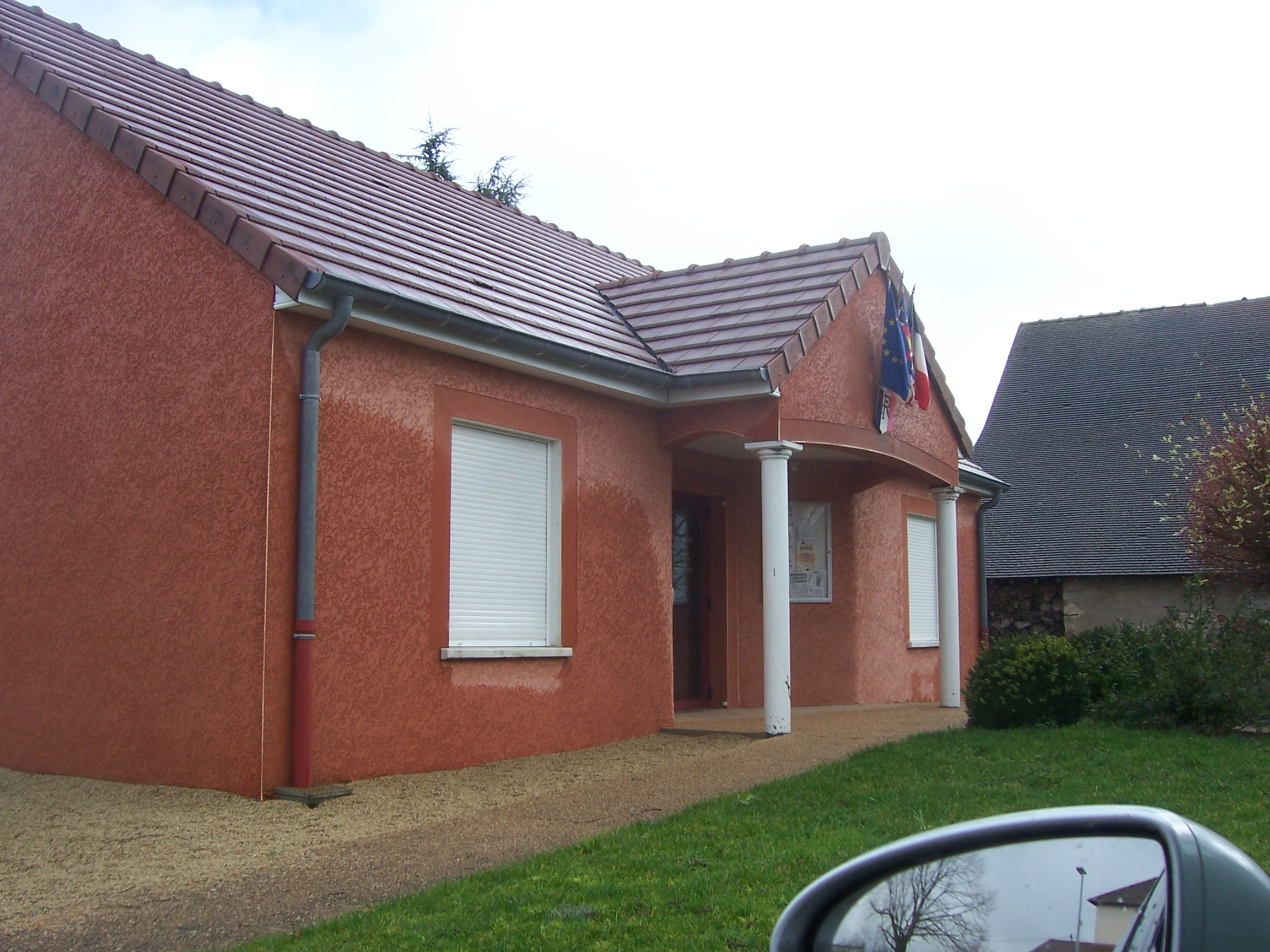 Mairie de Mary